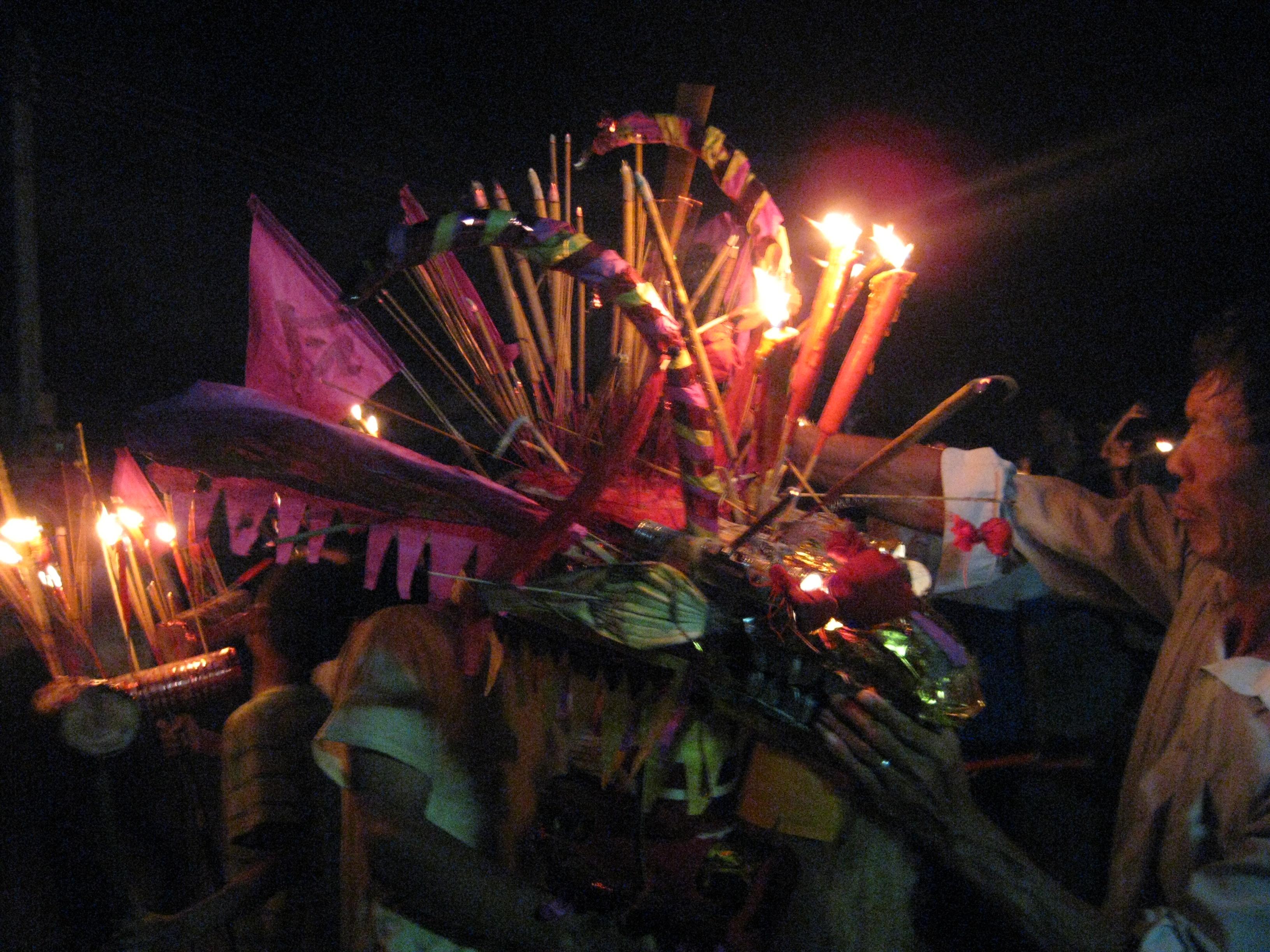 农历七月三十地藏王诞双水镇岭头乡的舞蕉龙